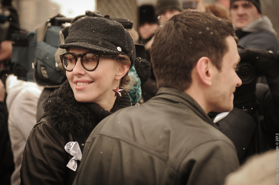 26 февраля 2012, в Москве, прошла акция за честные выборы. На протяжении всего Садового Кольца стояли люди и держались за руки. Проезжающие автомобили приветствовали их сигналами. По данным организаторов, численность участников составила свыше 30 000 человек.